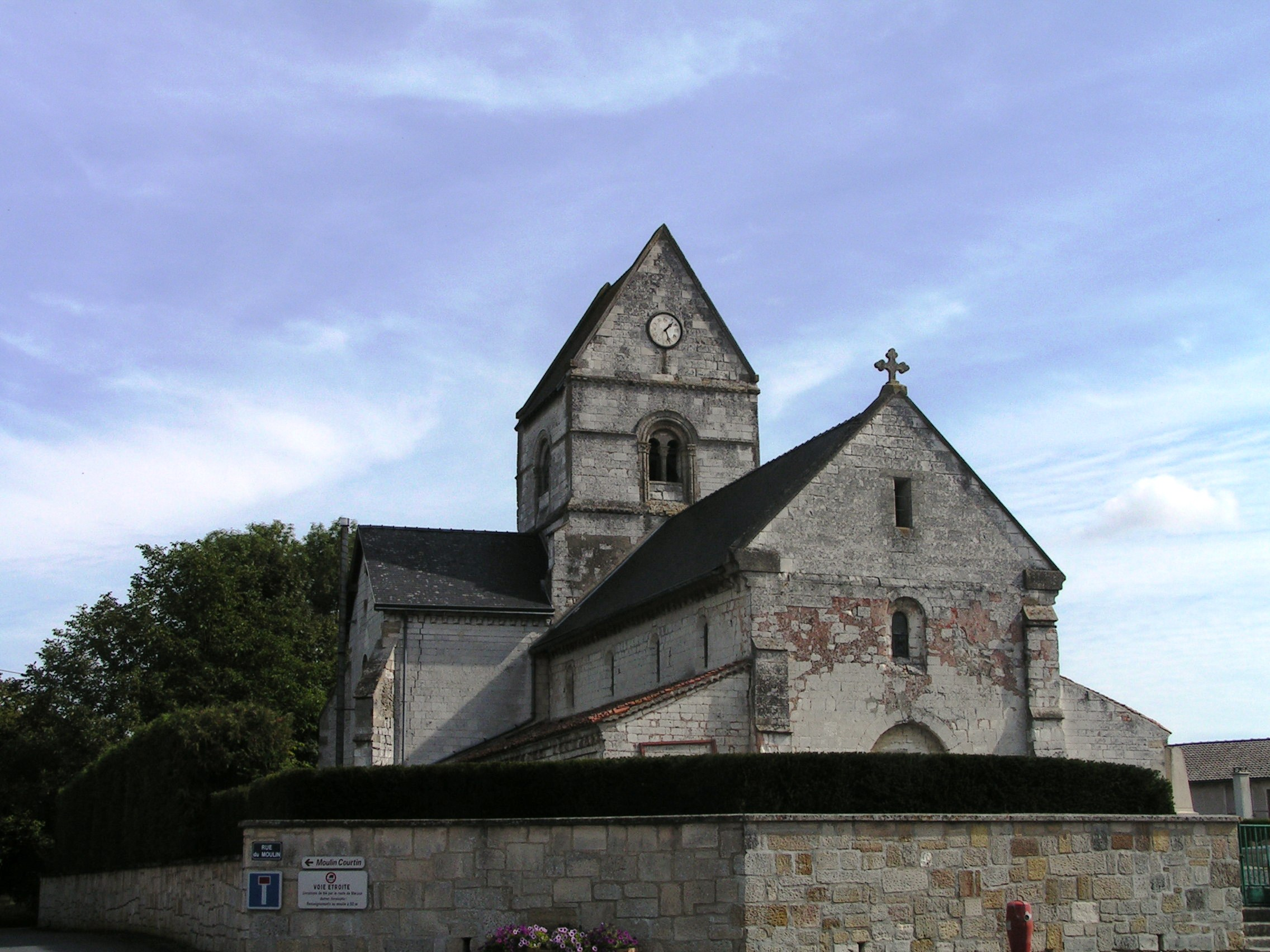 Église Saint-Nicolas-et-Saint-Gérald de Francheville (Inscrit) .